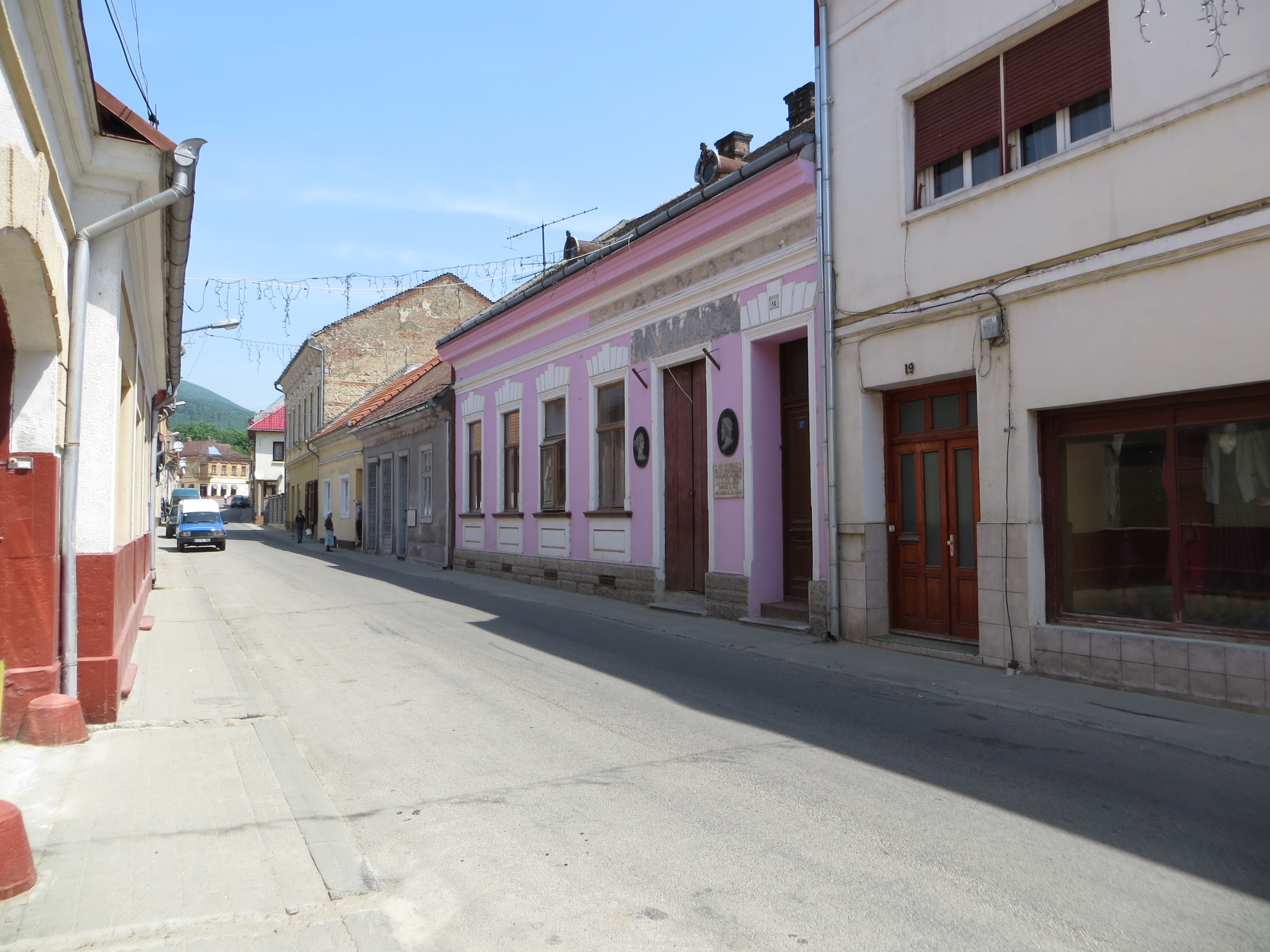 Farmacia Knoblauch, azi locuință